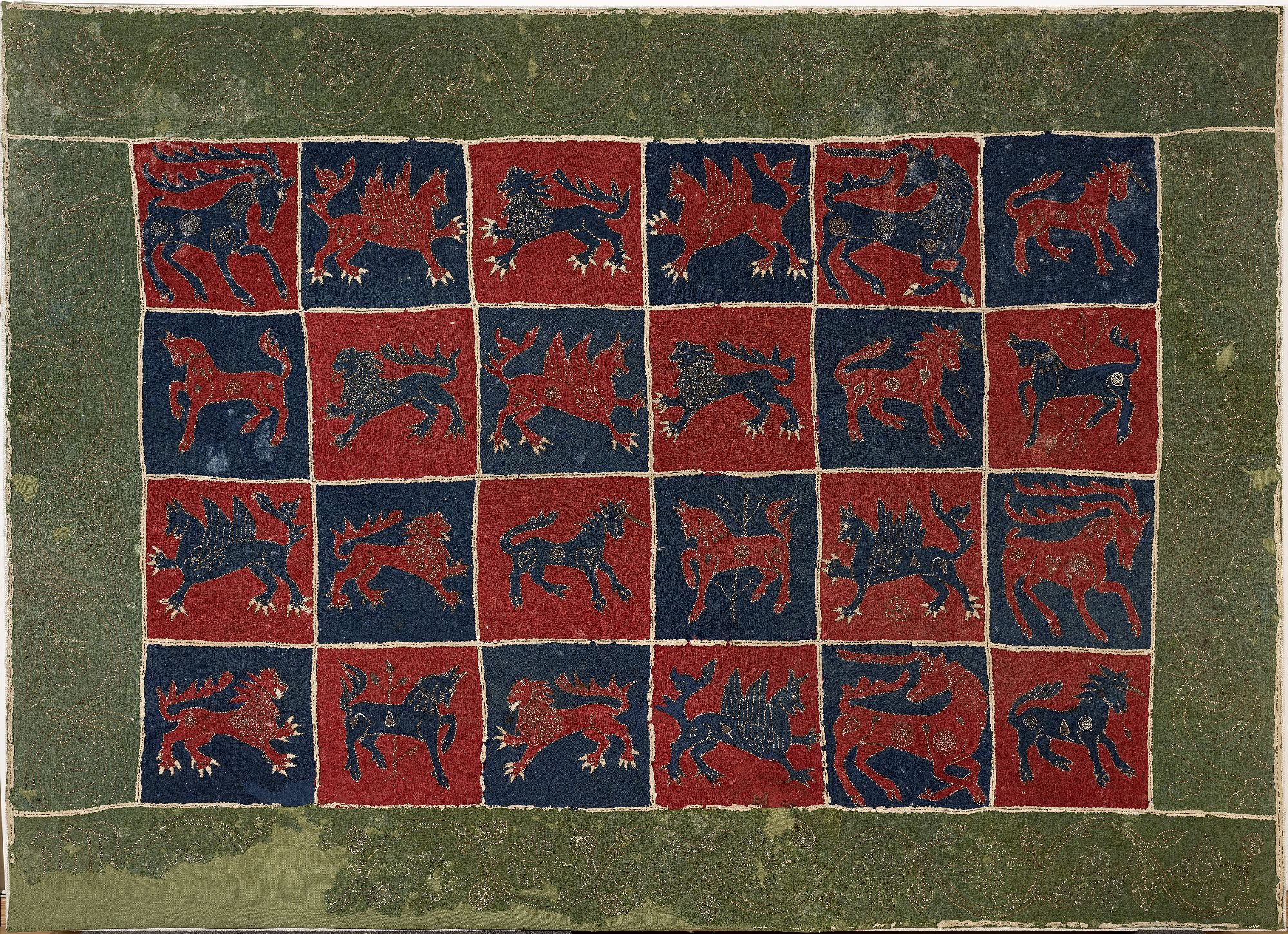 Skepptunatäcket. Statens historiska museum, inventarienummer 32698.